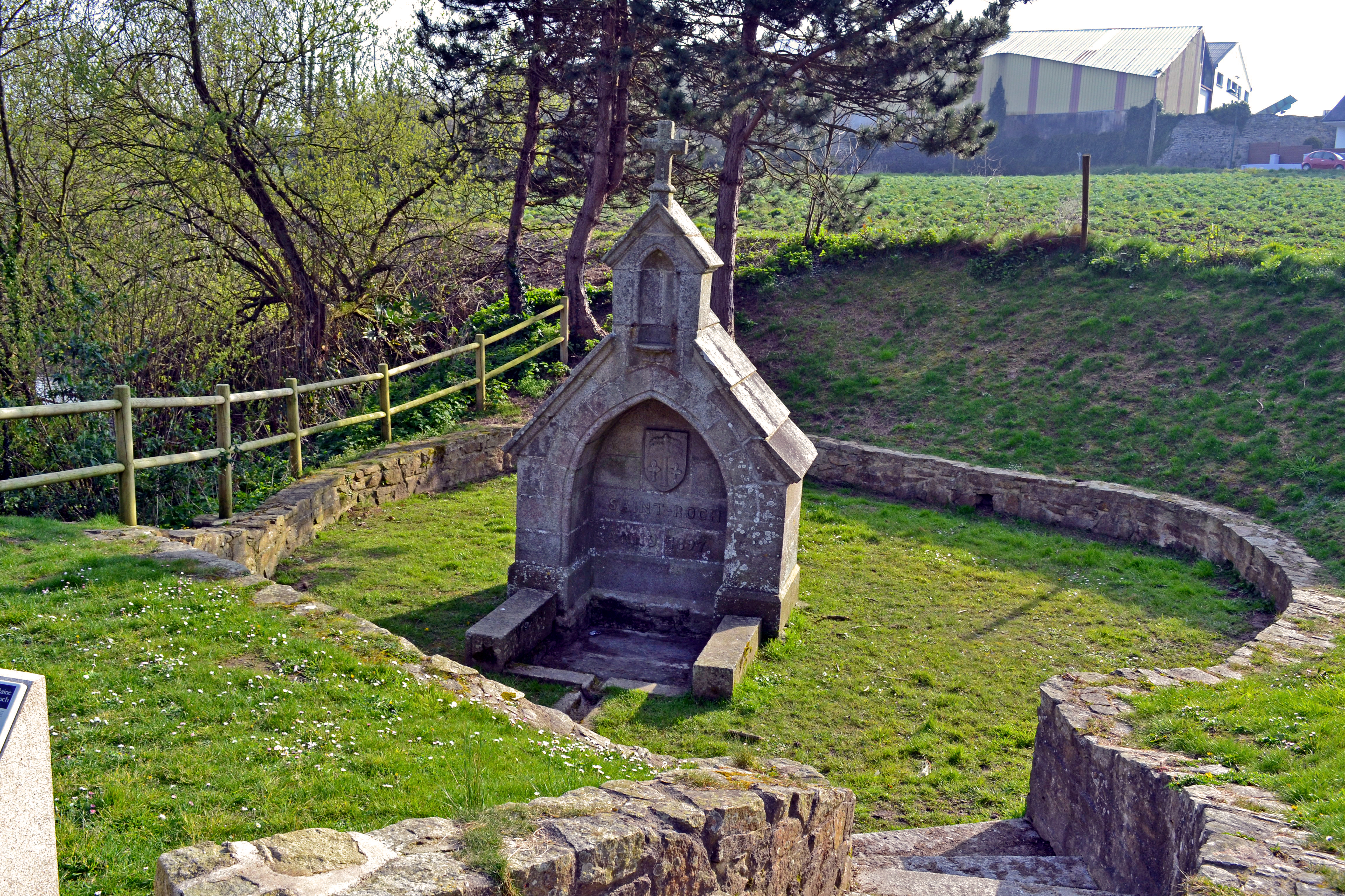 édifiée en 1630, après une épidémie de peste, en même temps qu'une chapelle (aujourd'hui disparue), cette fontaine fut reconstruite en 1897 par la famille de Guébriant sur le chemin menant au château de Kernévez à Saint-Pol-de-Léon, dans le quartier dit aussi de la « Magdeleine ».